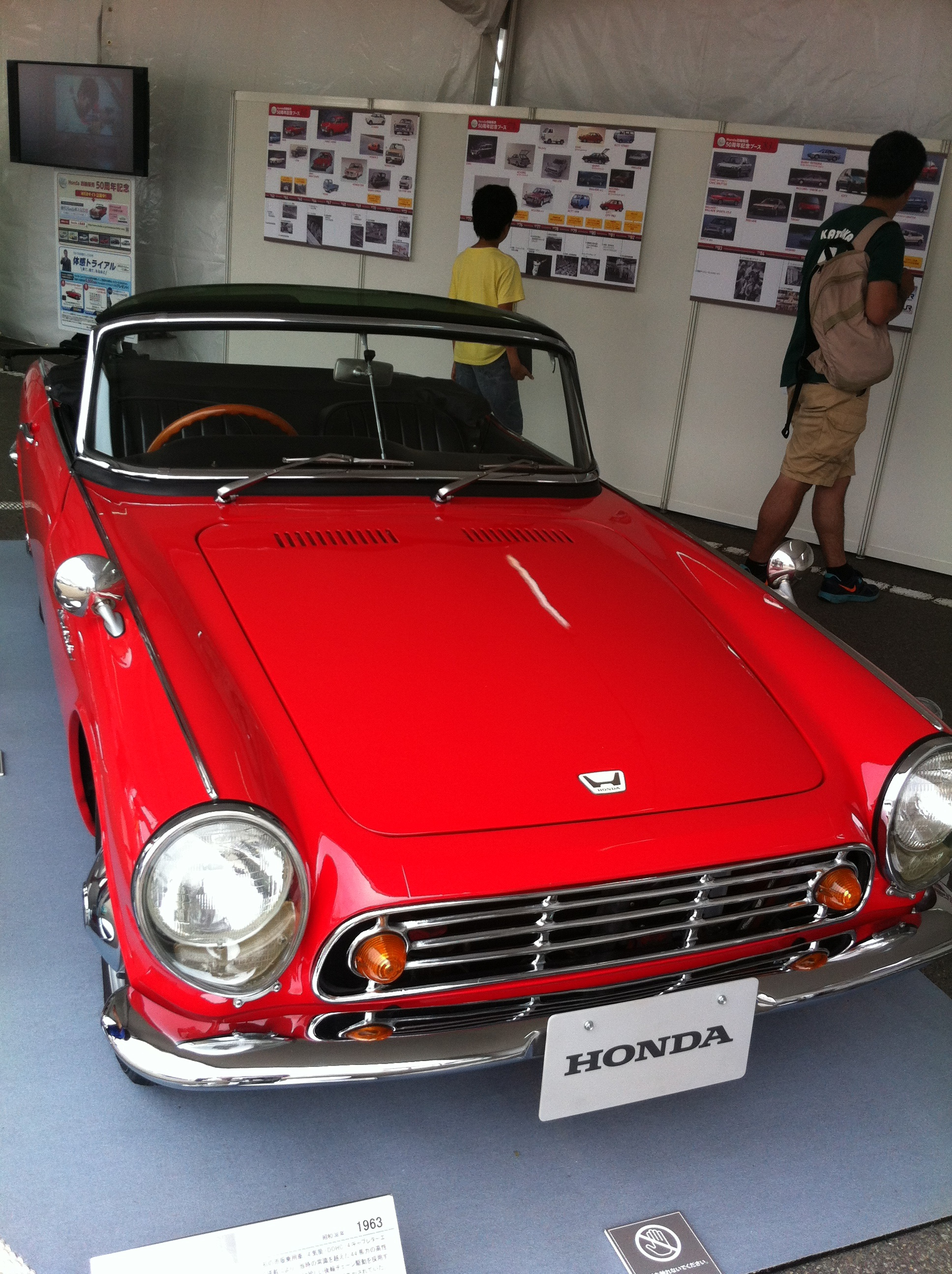 車